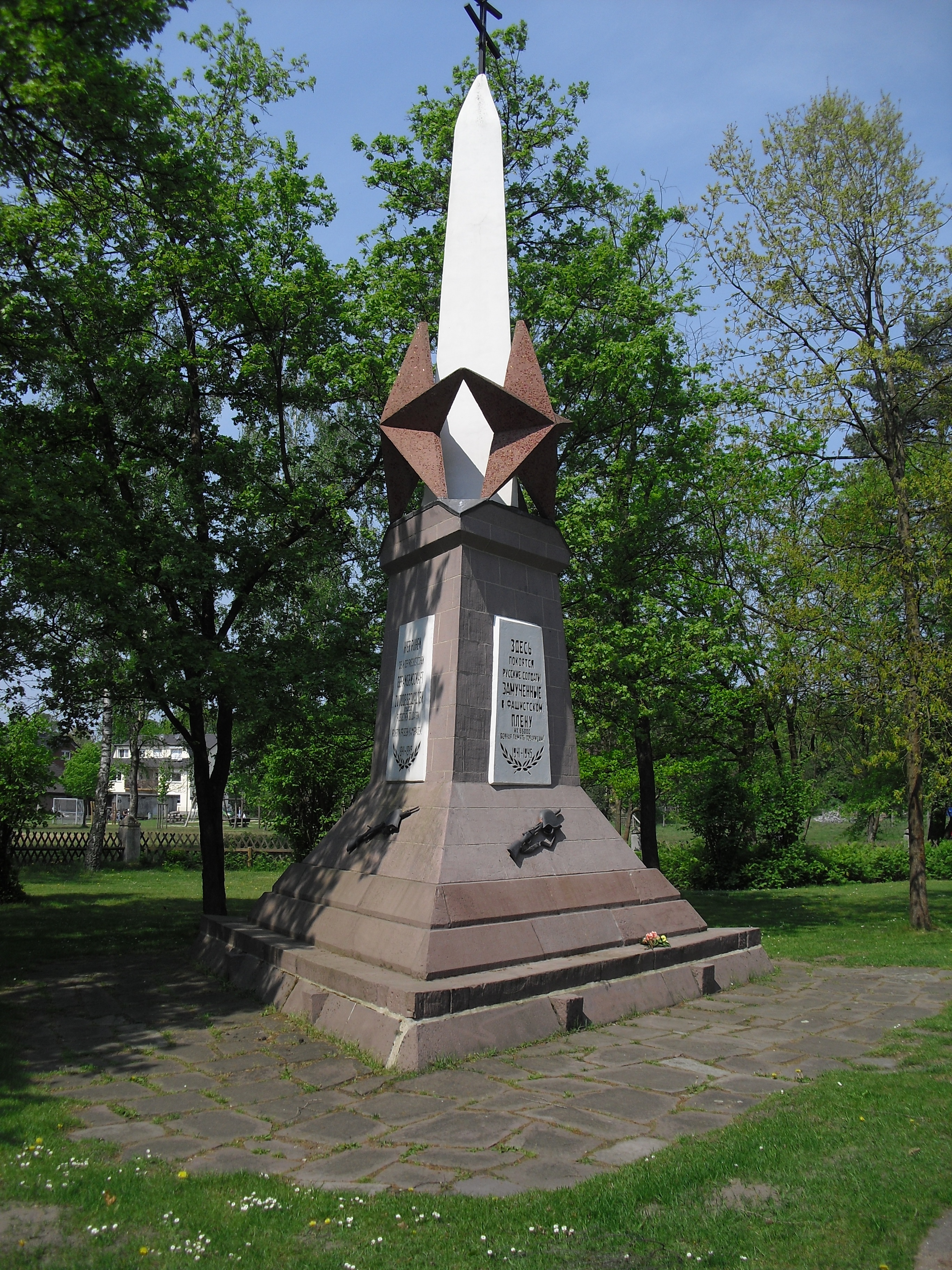 Obelisk auf dem Ehrenfriedhof in Stukenbrock